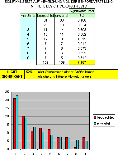 Signifikanztest auf Benfordverteilung